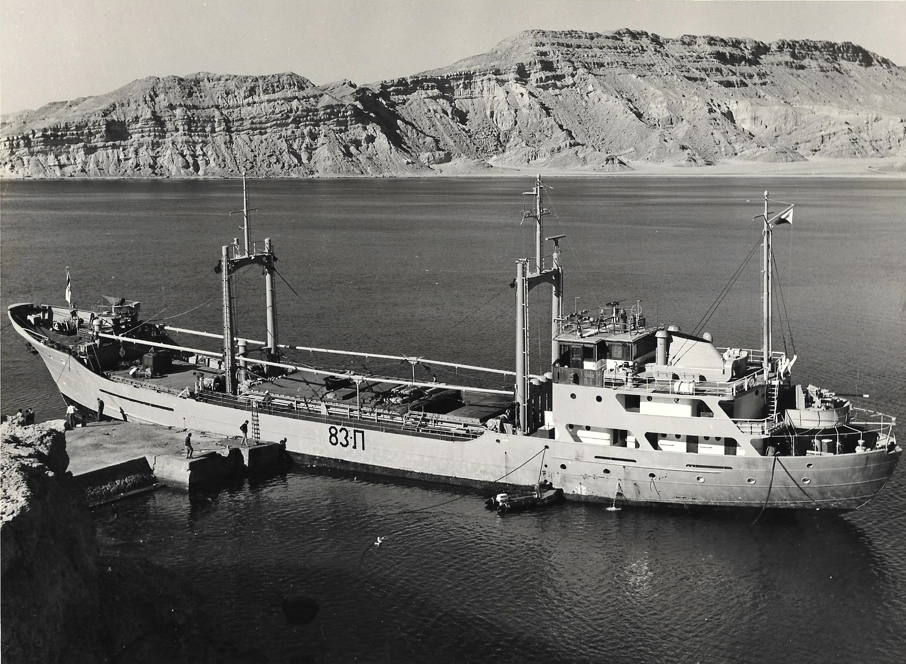 אנית האספקה אח"י בת ים במעגן מפרץ שלמה